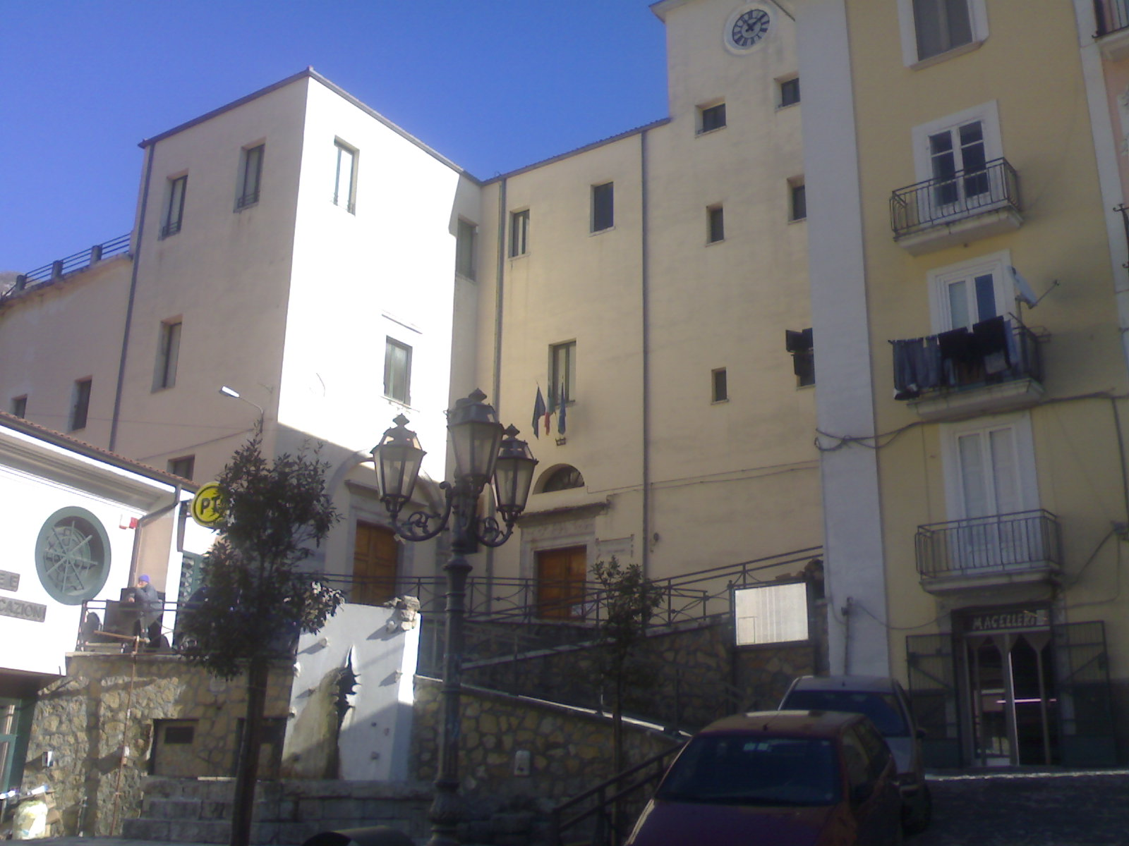 Palazzo Tercasio di Campagna, sede della prima tipografia a caratteri mobili del Principato Citeriore.